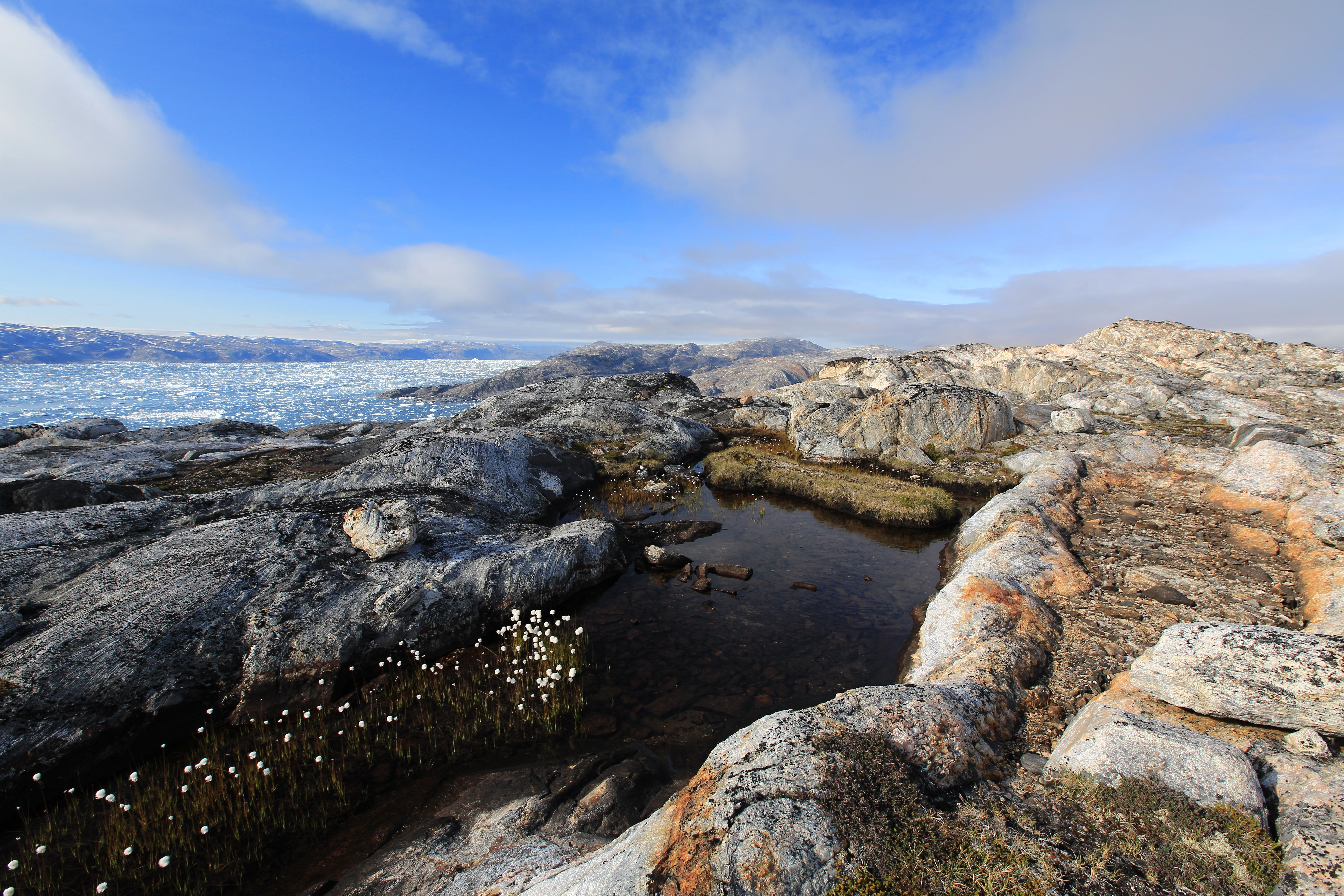 Tiniteqilaaq ridge